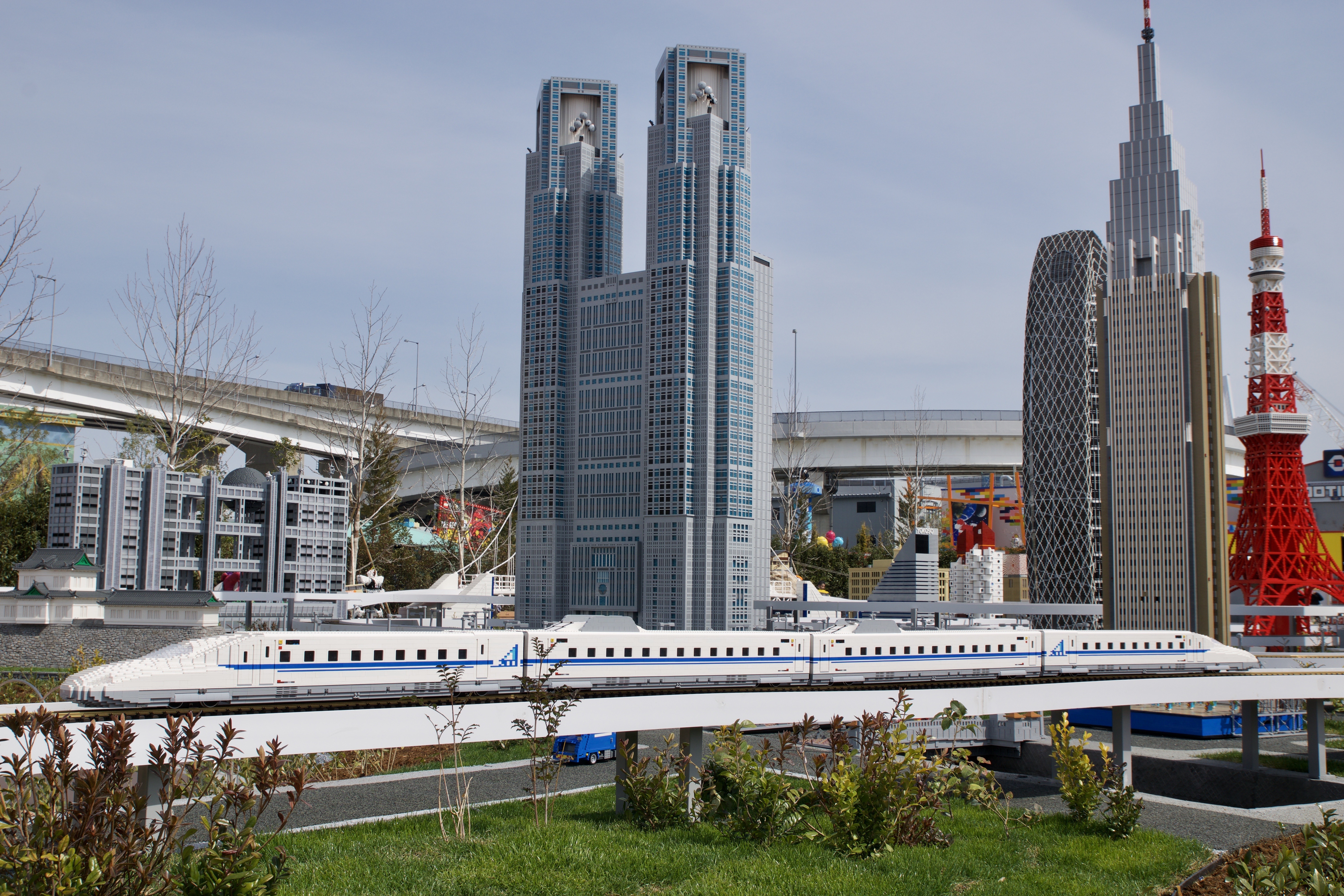 レゴランド・ジャパン ミニランド 新幹線